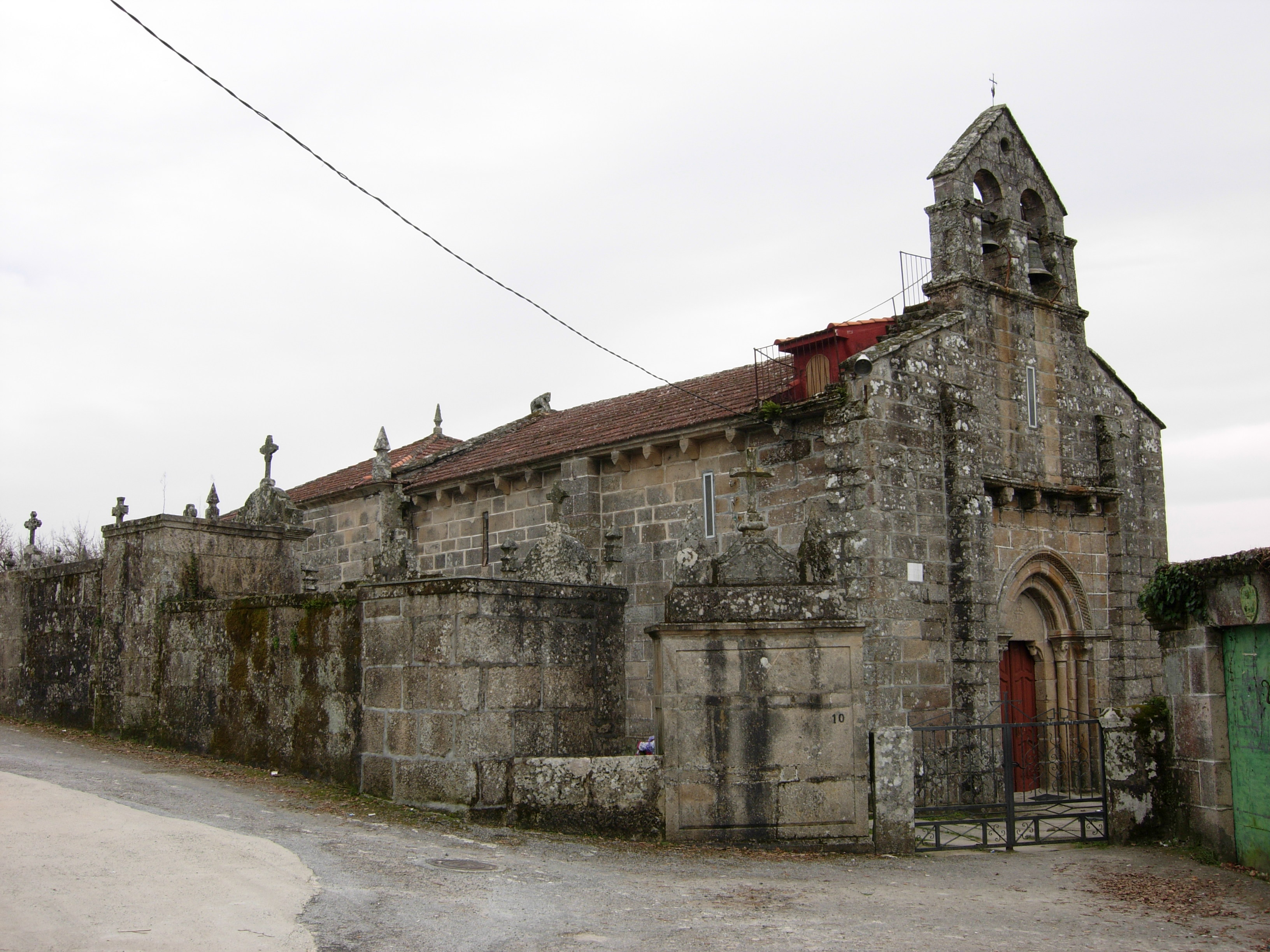 Igrexa de San Pedro de Garabás, Maside, Galiza